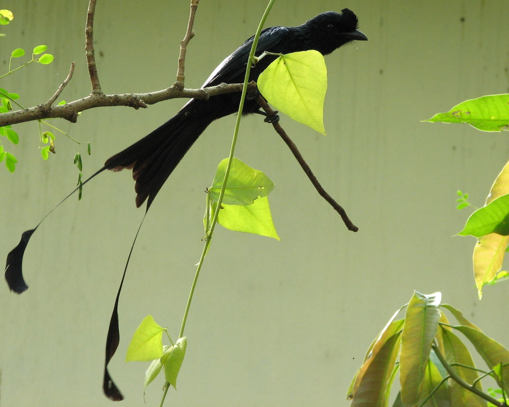 കാടുമുഴക്കി അഥവാ ഇരട്ടവാലൻ പക്ഷി(Racket-tailed drongo)- കോട്ടയത്തു നിന്നും പകർത്തിയ ചിത്രം.